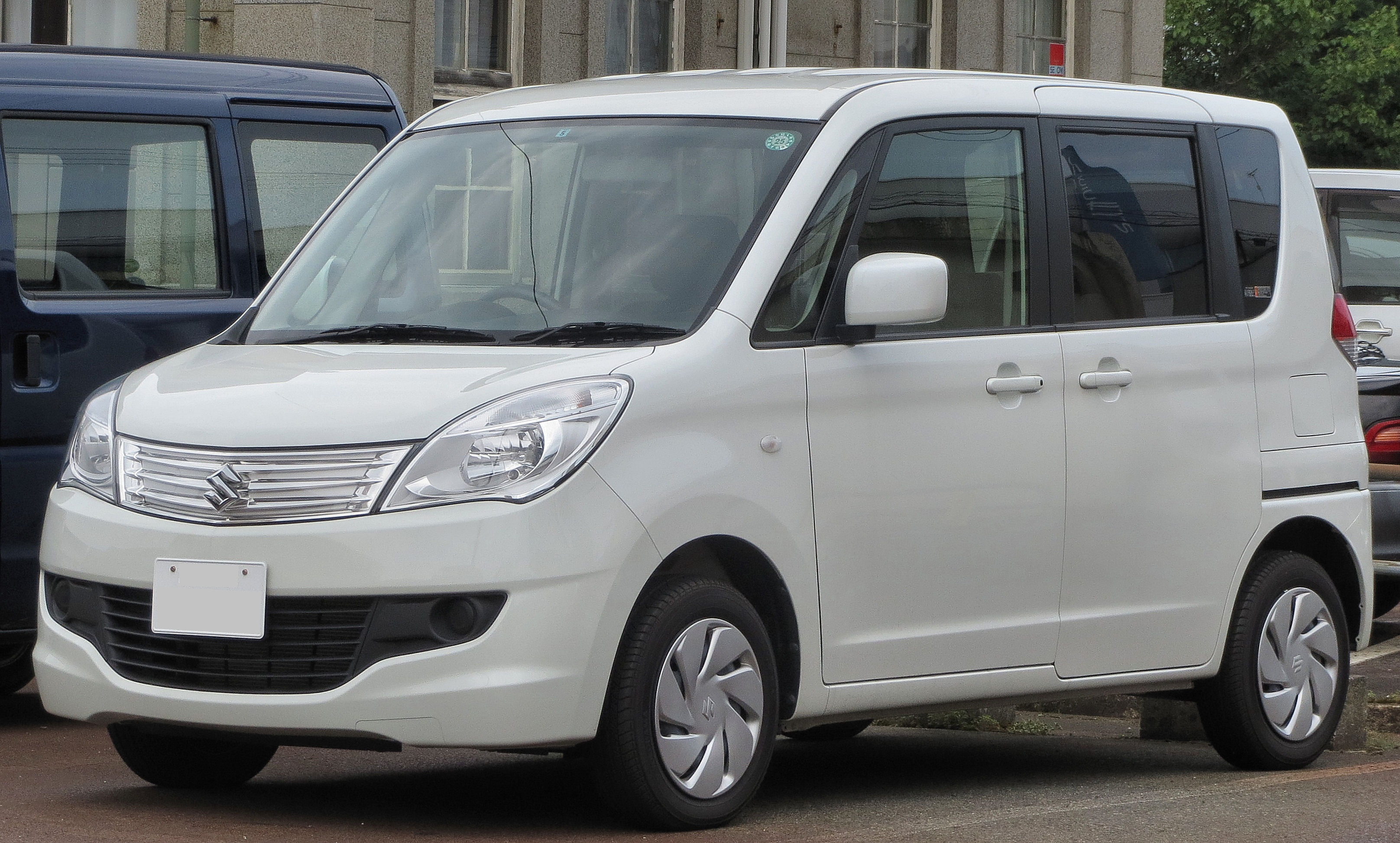 スズキ ソリオ G